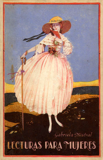 Portada de la antología "Lecutras para mujeres" de Gabriela Mistral.